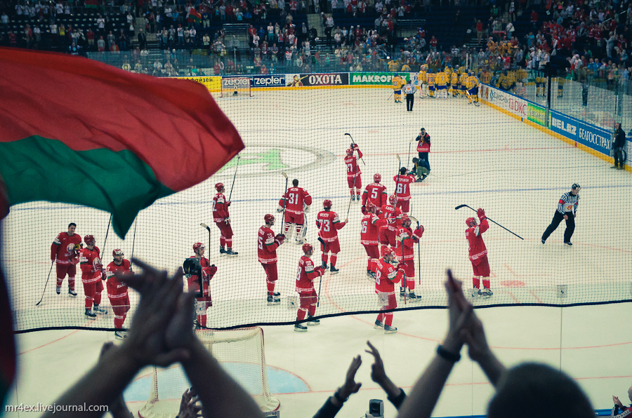 Чэмпіянат свету па хакеі з шайбай 2014. Беларусь-Швецыя